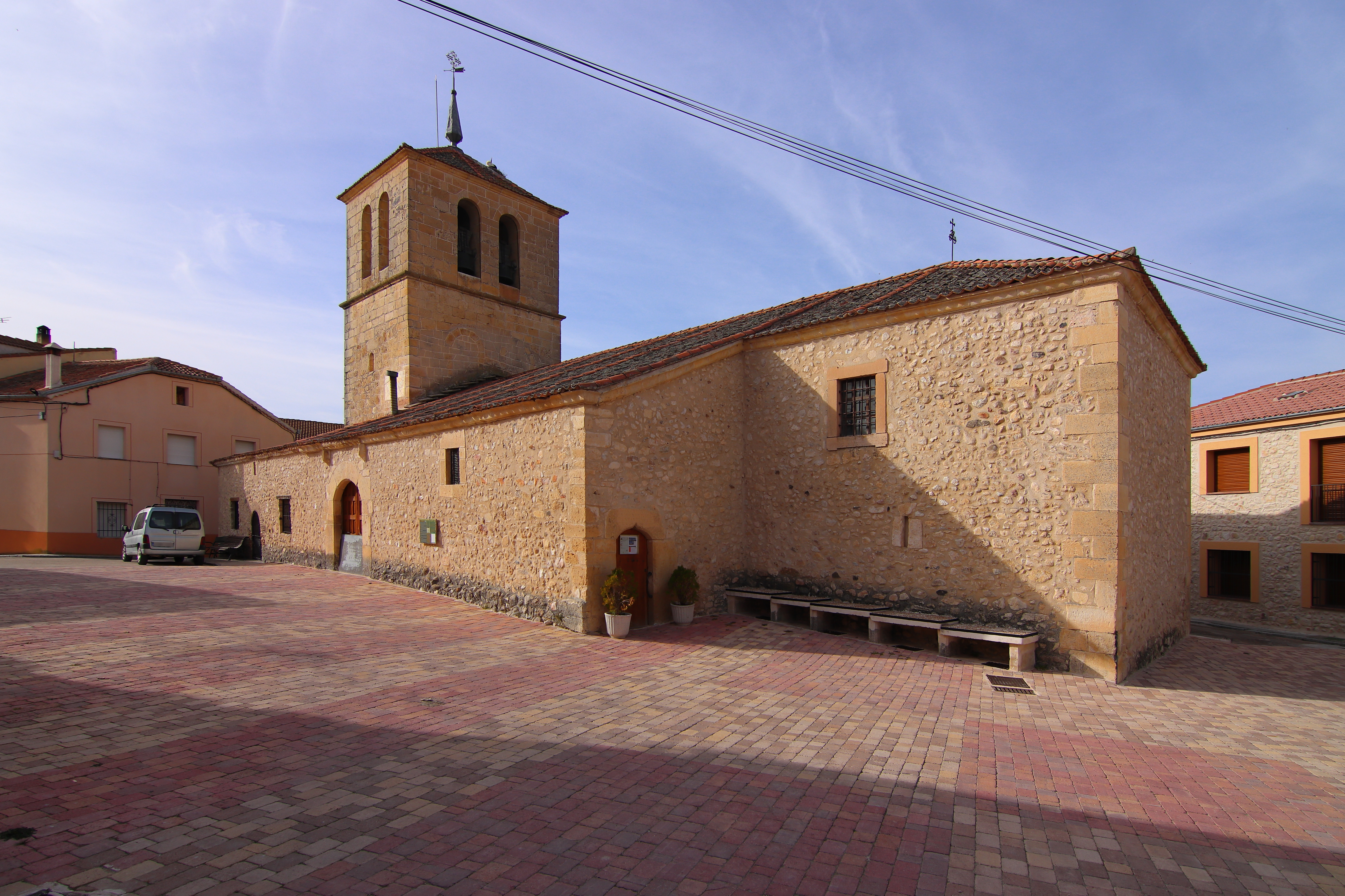 Iglesia de Santiago Apóstol, Puebla de Pedraza, fachadas sur